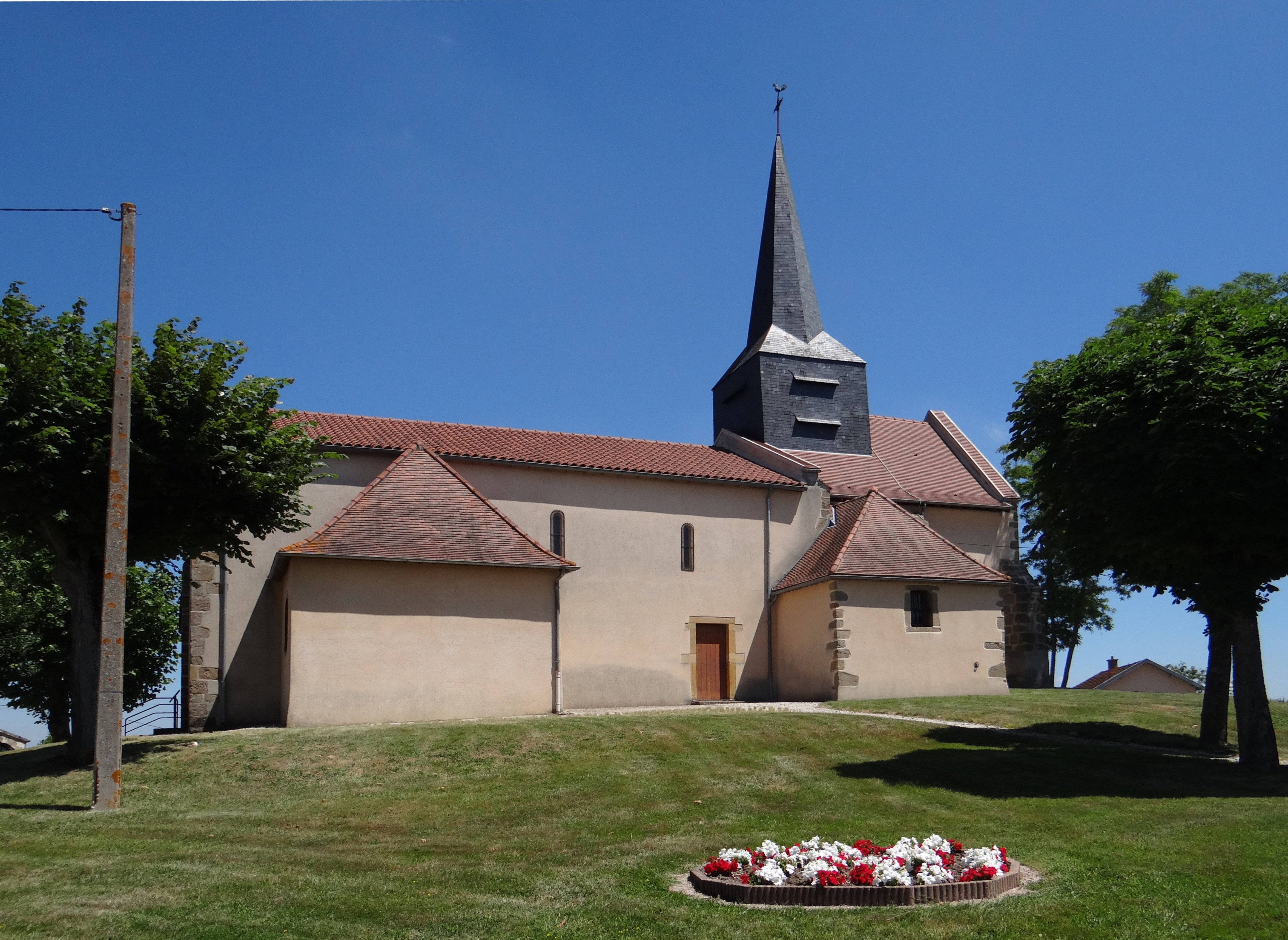 L'église de Saint-Didier-en-Donjon, Allier, France.